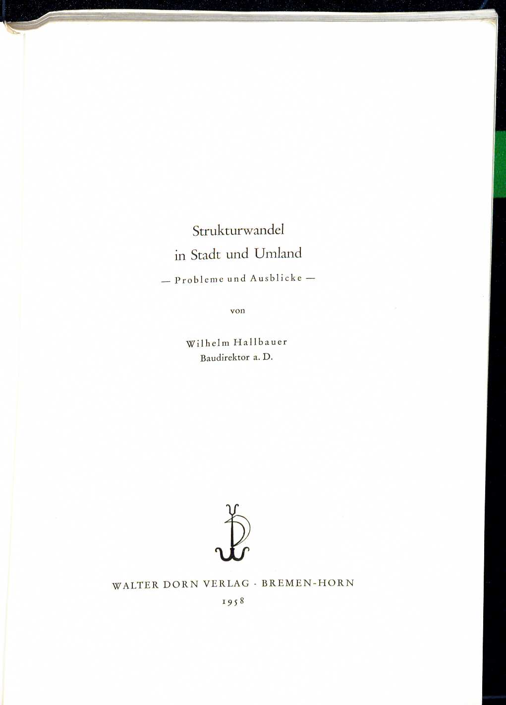 Wilhelm Hallbauer: Strukturwandel in Stadt und Umland : Probleme und Ausblicke. Raumforschung und Landesplanung : Abhandlungen, 34. Bremen-Horn : Dorn, 1958 Titelblatt